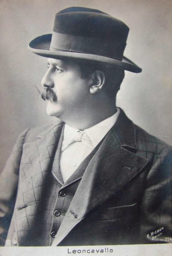 композитор Руджеро Леонкавалло, очень хороший снимок с фотокарточки